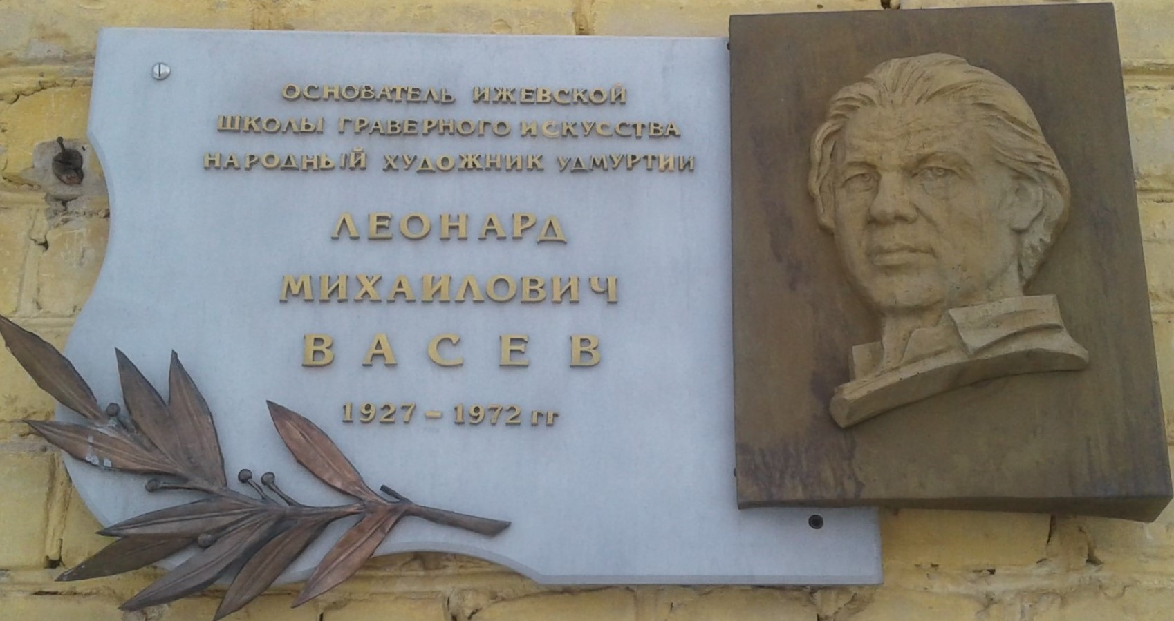 Памятная табличка на здании школы оружейного мастерства в городе Ижевск.